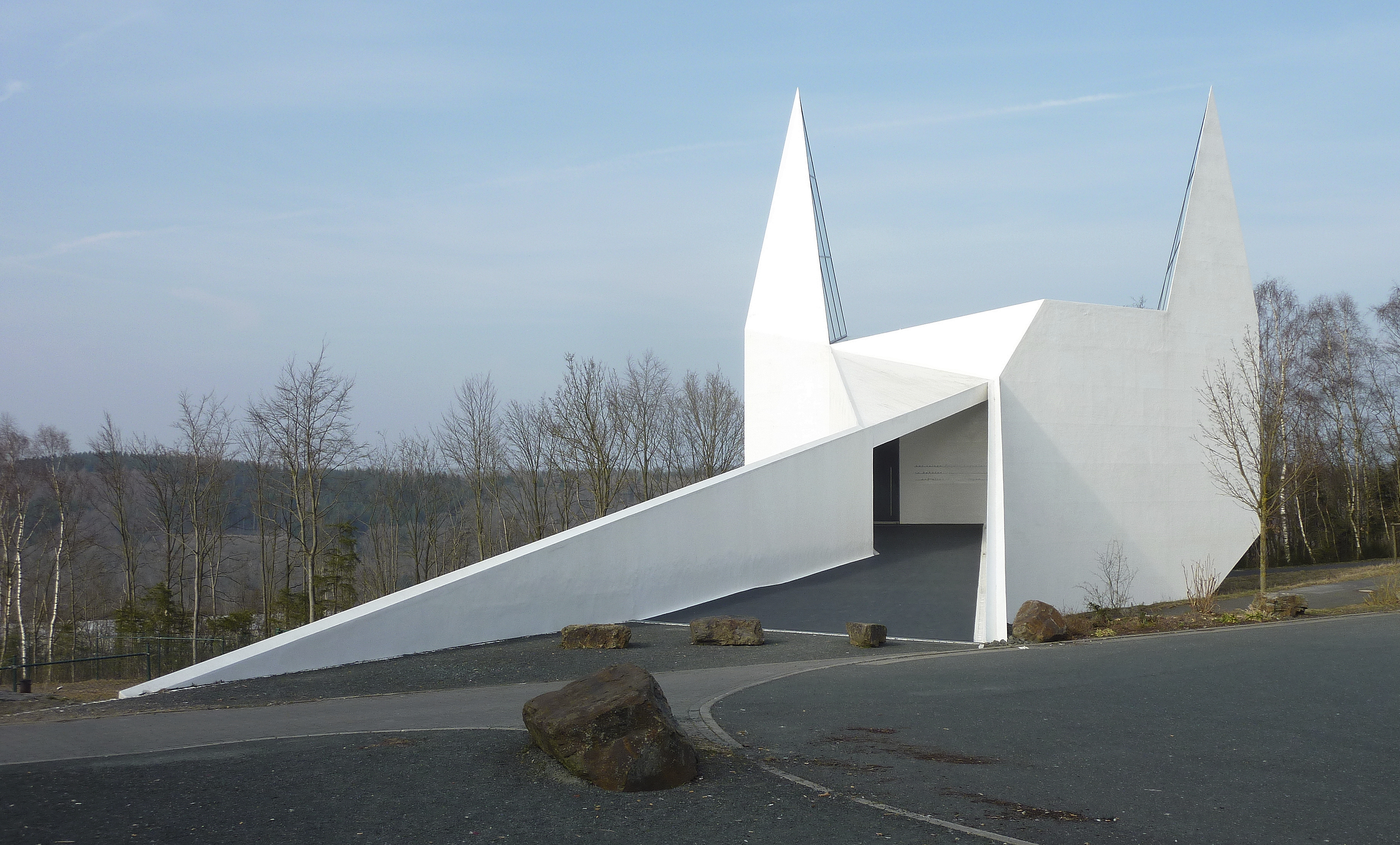 Die Autobahnkirche Siegerland ist ein christlich-ökumenischer Sakralbau im Bundesland Nordrhein-Westfalen. Die im Jahr 2013 eingeweihte, täglich rund um die Uhr geöffnete Kapelle steht am Rasthof Wilnsdorf im namensgebenden Siegerland an der Bundesautobahn 45, Anschlussstelle 23, Wilnsdorf.